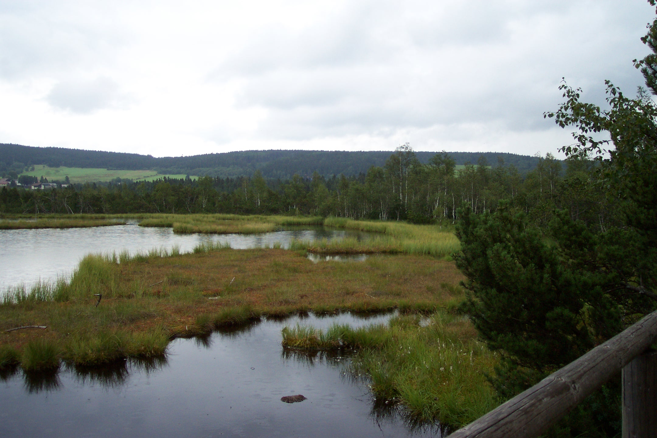 Šumava, Czech republic, Chalupská slať near Borová Lada - Šumava, Chalupská slať nedaleko Borové Lady